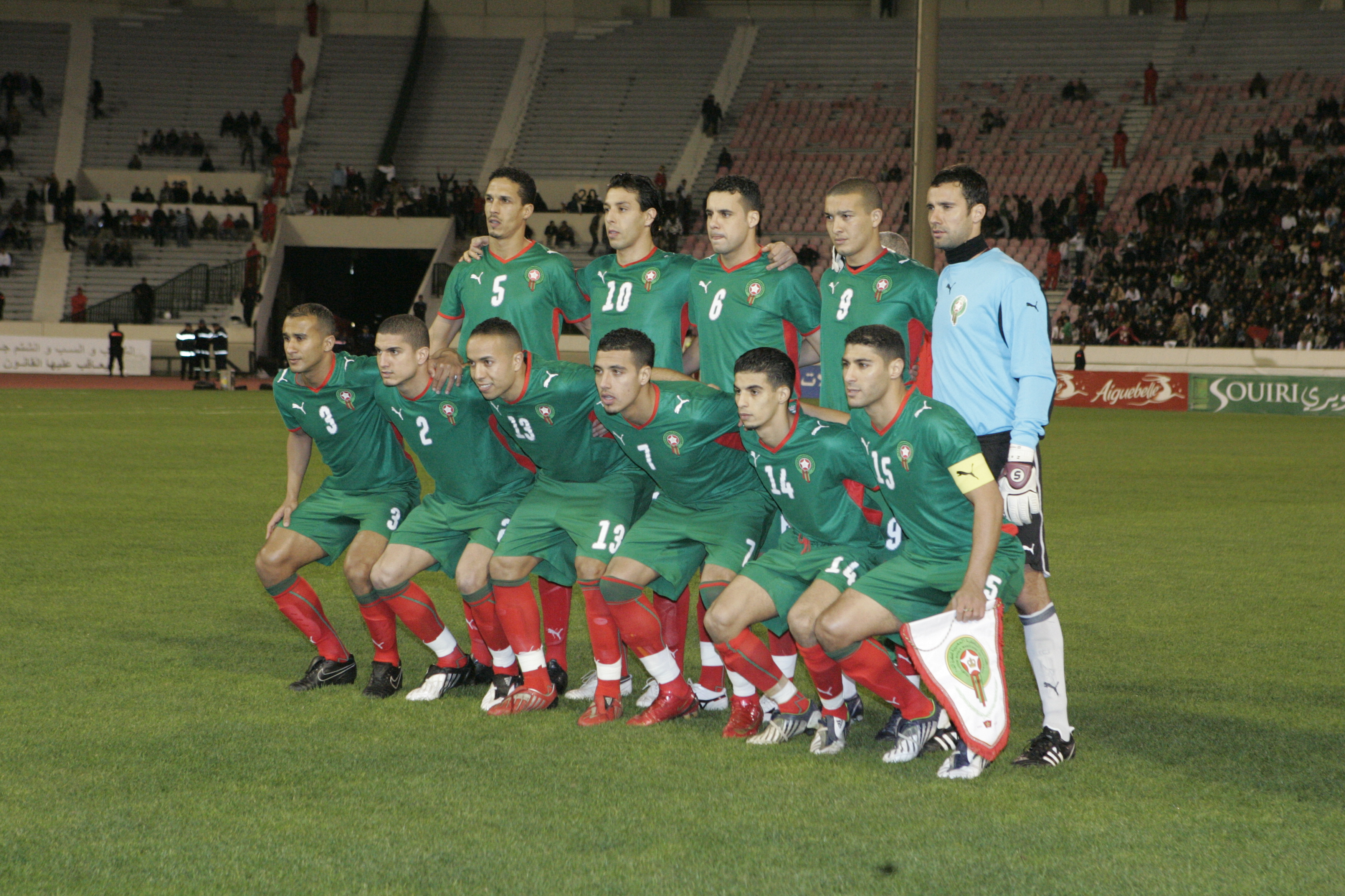 L'equipe du maroc.talal karkouri.mounir el hamdaoui.erbaté el amin.nabil baha.karim zaza.badr el kadouri.michael basser.houcine kharja.nabil dinar.m'barek boussoufa.youssef safri